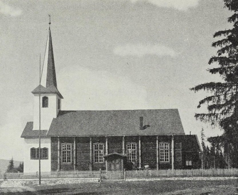 Grymyr gamle kirke, som brant i 1999. Fra «Hadeland: Bygdenes historie 1» (Hadelands bygdebokkomité, 1932), s. 277.